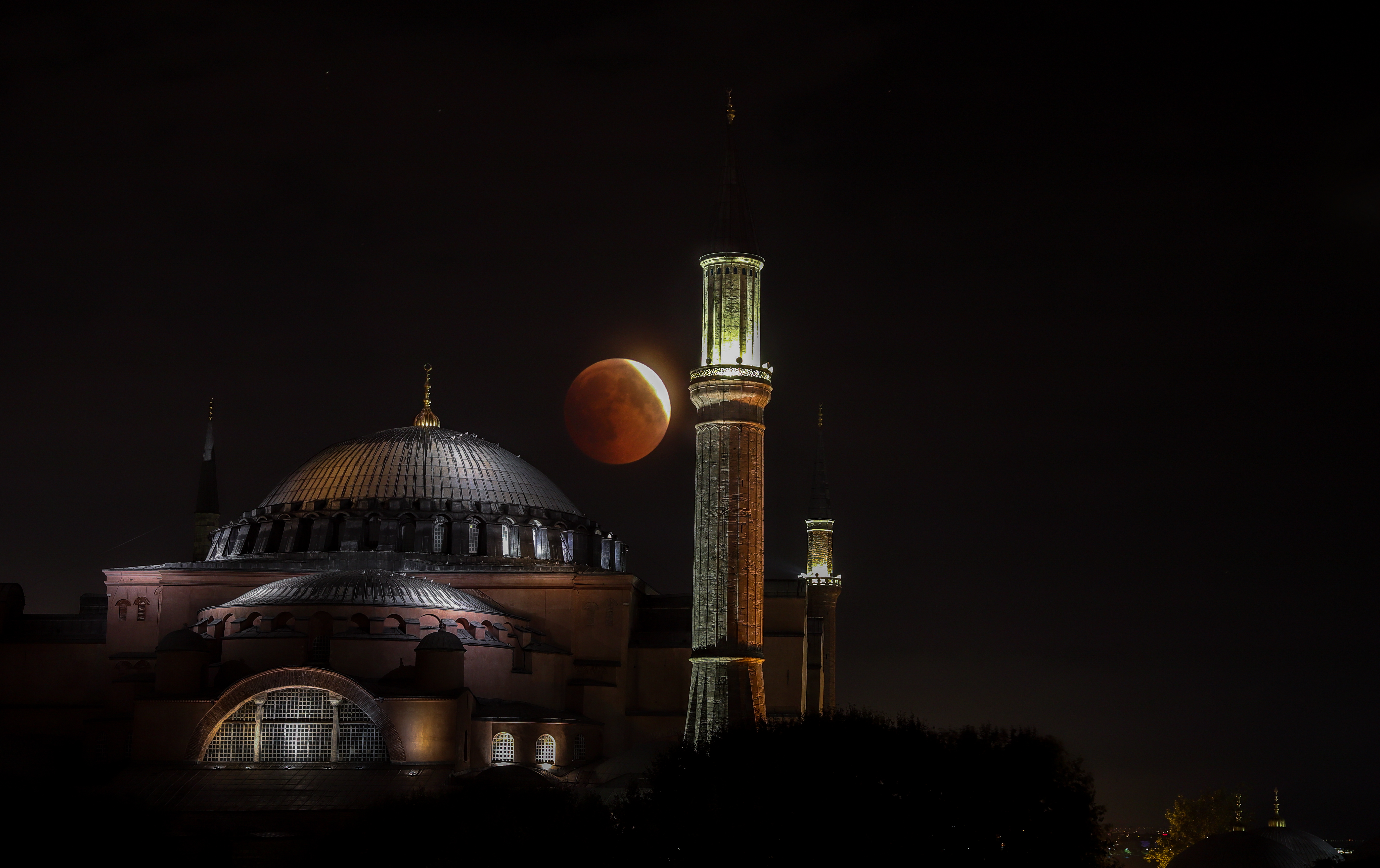 la perfetta eclissi di luna del 2018